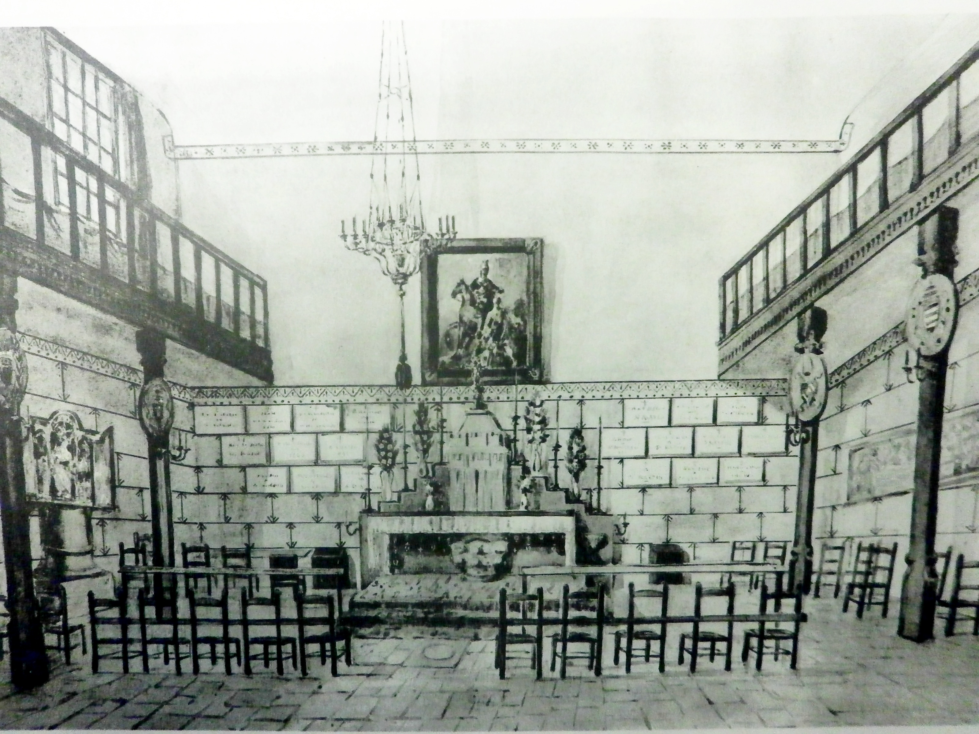 Chapelle provisoire dédiée au culte de saint Martin dans les années 1880